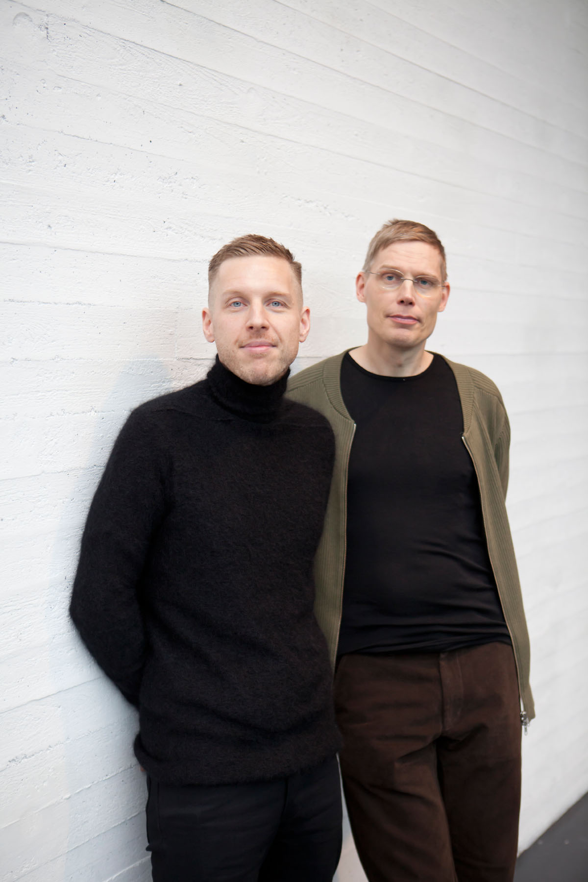 Taiteilijat IC-98 eli Patrik Söderlund ja Visa Suonpää Artists IC-98 aka Patrik Söderlund & Visa Suonpää in Kiasma photo:Finnish National Gallery / Pirje Mykkänen